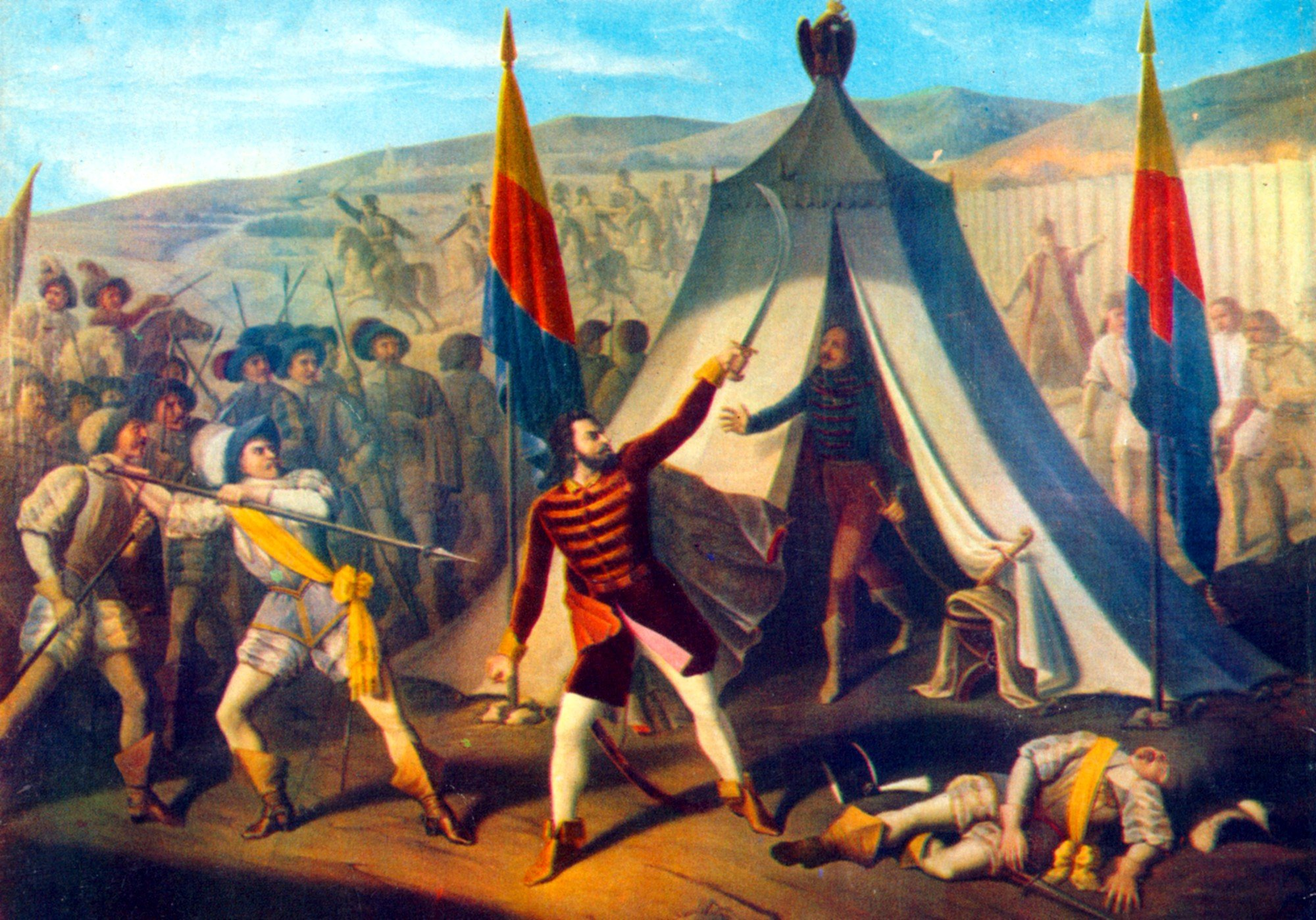 Moartea lui Mihai Viteazul, Muzeul Național de Artă al României